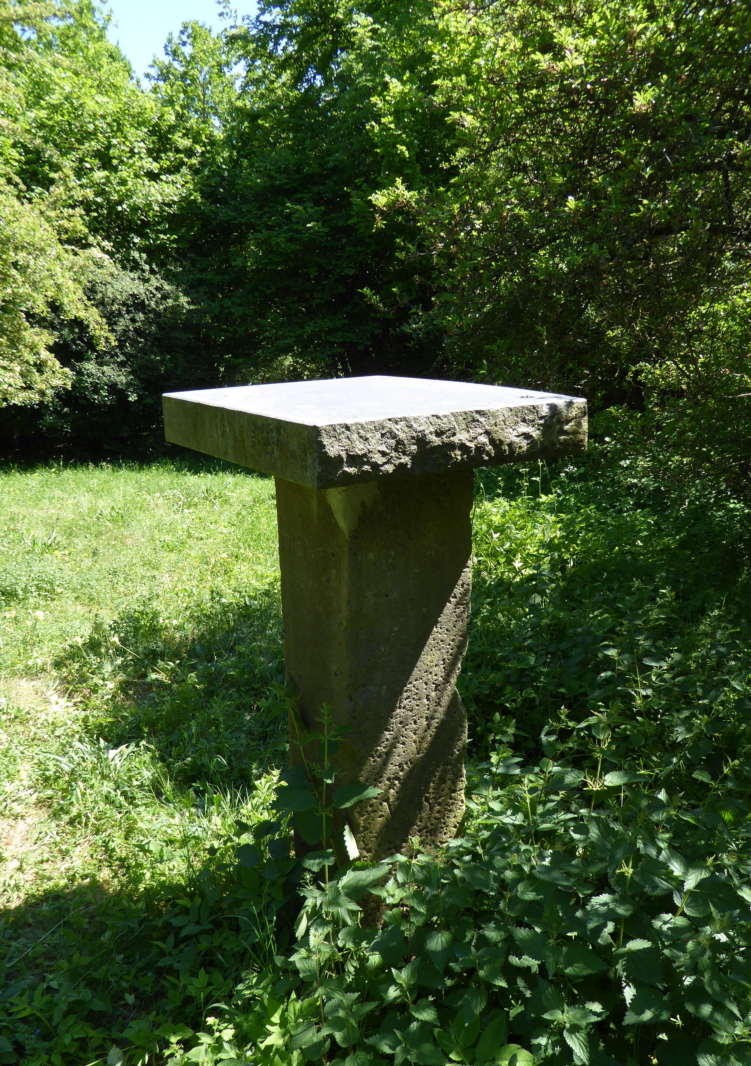 Trigonometrischer Vermessungpunkt auf dem Gieseberg bei Deiderode, Gemeidne Friedland, Südniedersachsen. Vermessungsstein (Gaußstein) der Landesvermessung durch Carl Friedrich Gauß, um 1830. Der Pfeiler trägt auf einer Seite die eingemeißelte Inschrift „Hannov“, auf der gegenüberliegenden „Vermessg.“ und „1836“ (?, letzte Ziffer schlecht lesbar). Die obere Abdeckplatte ist neuer und wurde mit Mörtel aufgesetzt, es handelt sich um ein Teilstück eines Grabsteins mit eingemeißelten (Todes-)Jahreszahlen 1961 und 1971